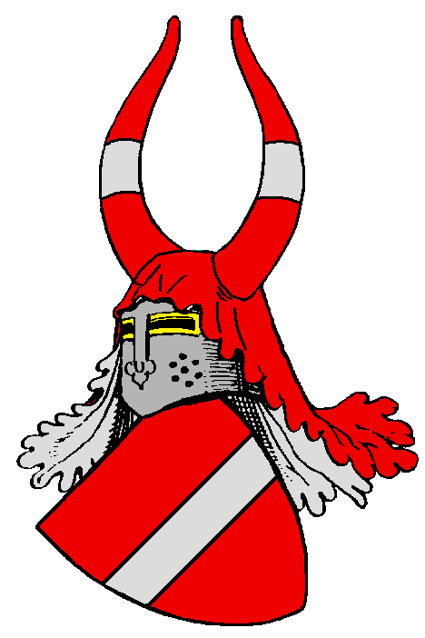 Stammwappen des alten dänischen Adelsgeschlechts Krabbe, das auch in Schweden sesshaft war und heute in Großbritannien und Argentinien fortbesteht